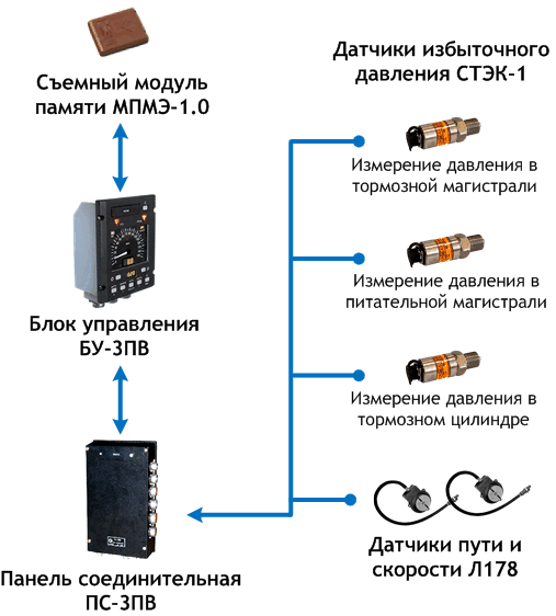 Базовая комплектация комплекса КПД-3ПВ